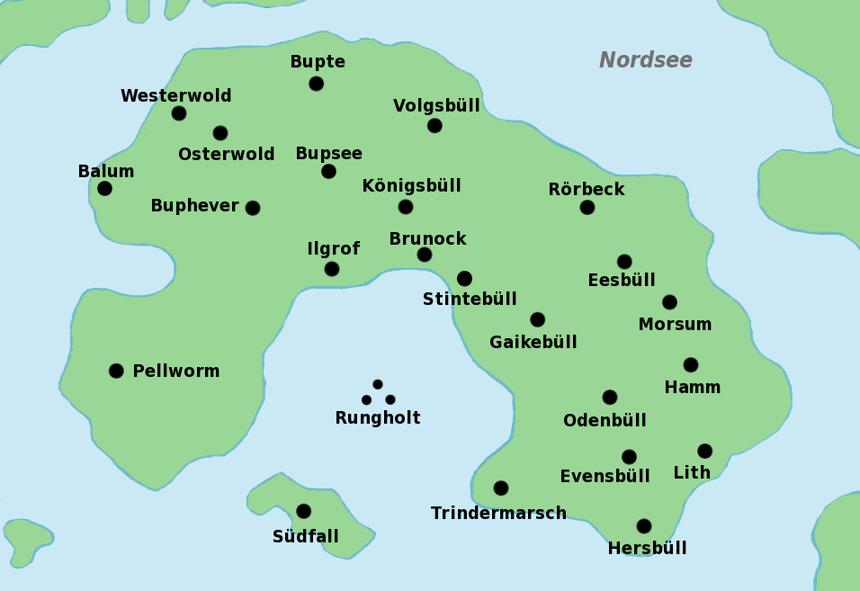 Die Insel Strand nach 1362, nach alten Karten von Johannes Mejer nachgezeichnet